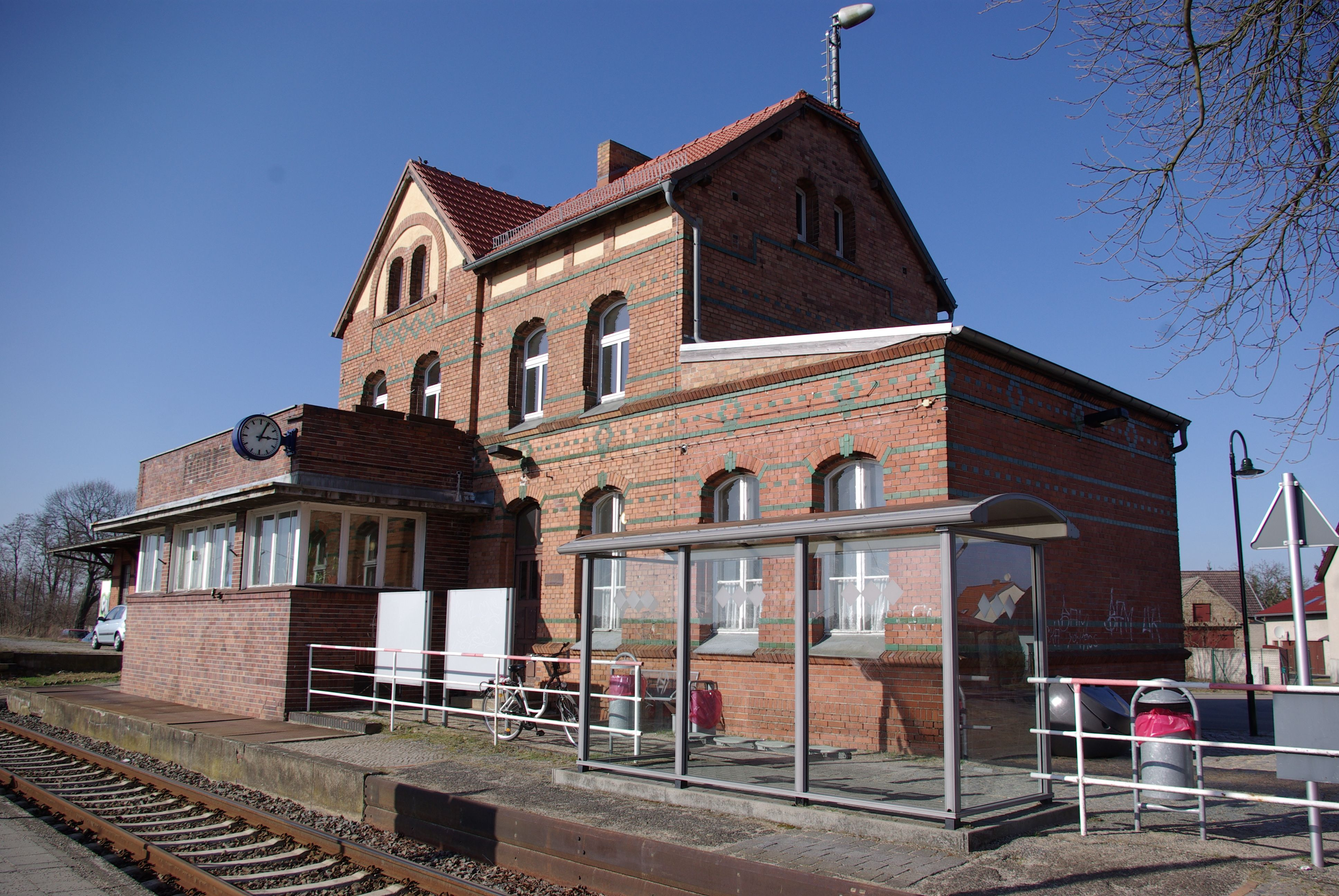 Fredersdorf in der Gemeinde Heidesee in Brandenburg. Der Bahnhof steht unter Denkmalschutz.